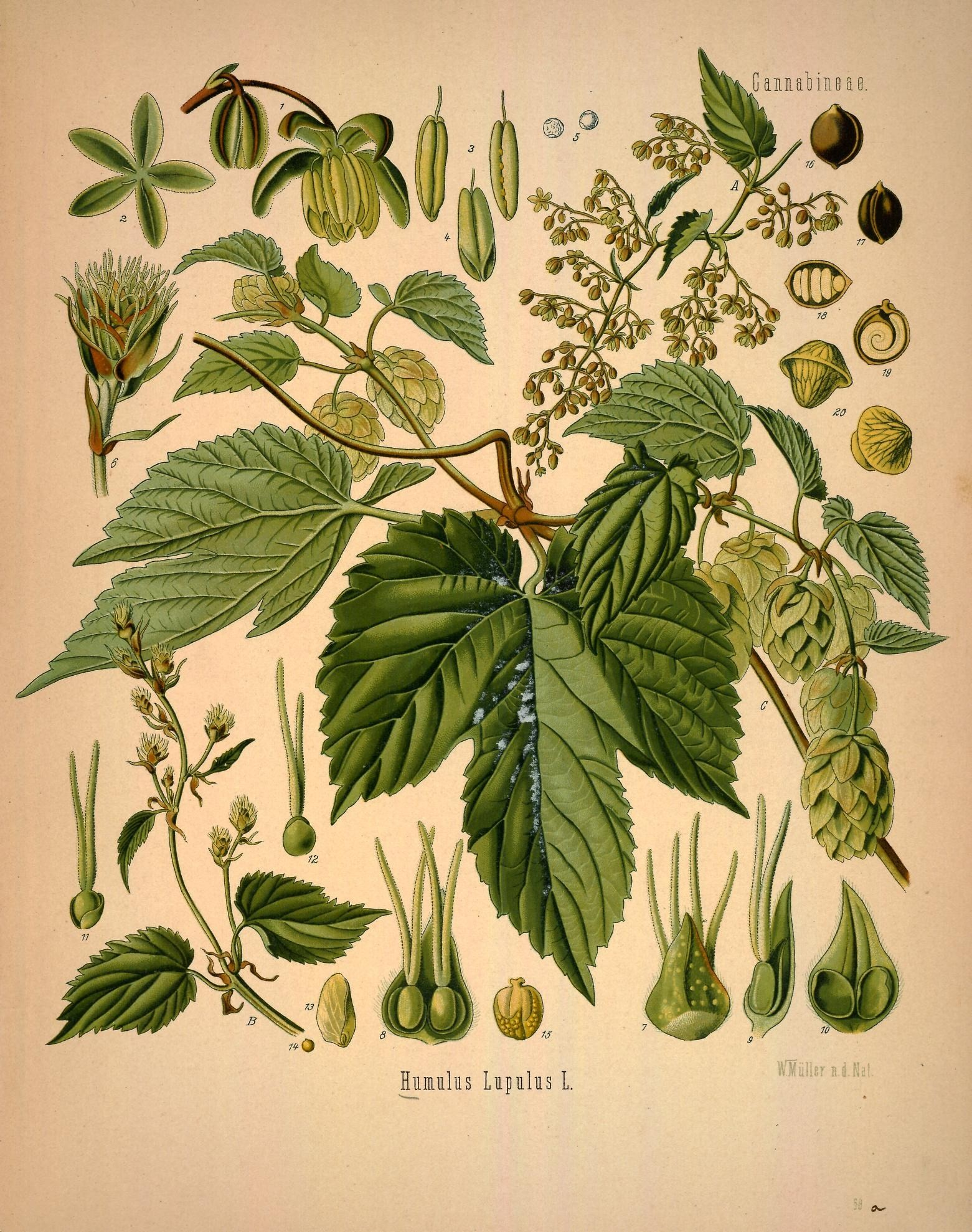 Hopfen. A männlicher, B weiblicher Blüthenstand, nat. Grösse; C Fruchtzweig, desgl.; 1 männliche Blüthe, vergrössert; 2 Perigon der männl. Blüthe, desgl.; 3 Staubgefäss von verschiedenen Seiten, desgl.; 4 Staubgefäss mit geöffnetem Beutel, desgl.; 5 Pollen, desgl.; 6 weibliches Kätzchen, desgl.; 7, 8 Blüthenpaar der weiblichen Blüthe mit Deckblatt von der Rückseite und Vorderseite, desgl.; 9 einzelne Blüthe von der Seite mit Deckblättchen, desgl.; 10 Deckblatt und Deckblättchen vom Blüthenpaare, desgl.; 11, 12 einzelnes Blüthchen mit Deckblättchen, von verschiedenen Seiten, desgl.; 13 ausgewachsenes Deckblättchen mit Frucht, natürl. Grösse; 14 Frucht, desgl.; 15 die vom Perigon umschlossene, mit Harzdrüsen besetzte Frucht, vergrössert; 16, 17 Nüsschen ohne Perigon, von verschiedenen Seiten, desgl.; 18 und 19 Nüsschen im Quer- und Längsschnitt, desgl.; 20 Harzdrüsen, stärker vergrössert.